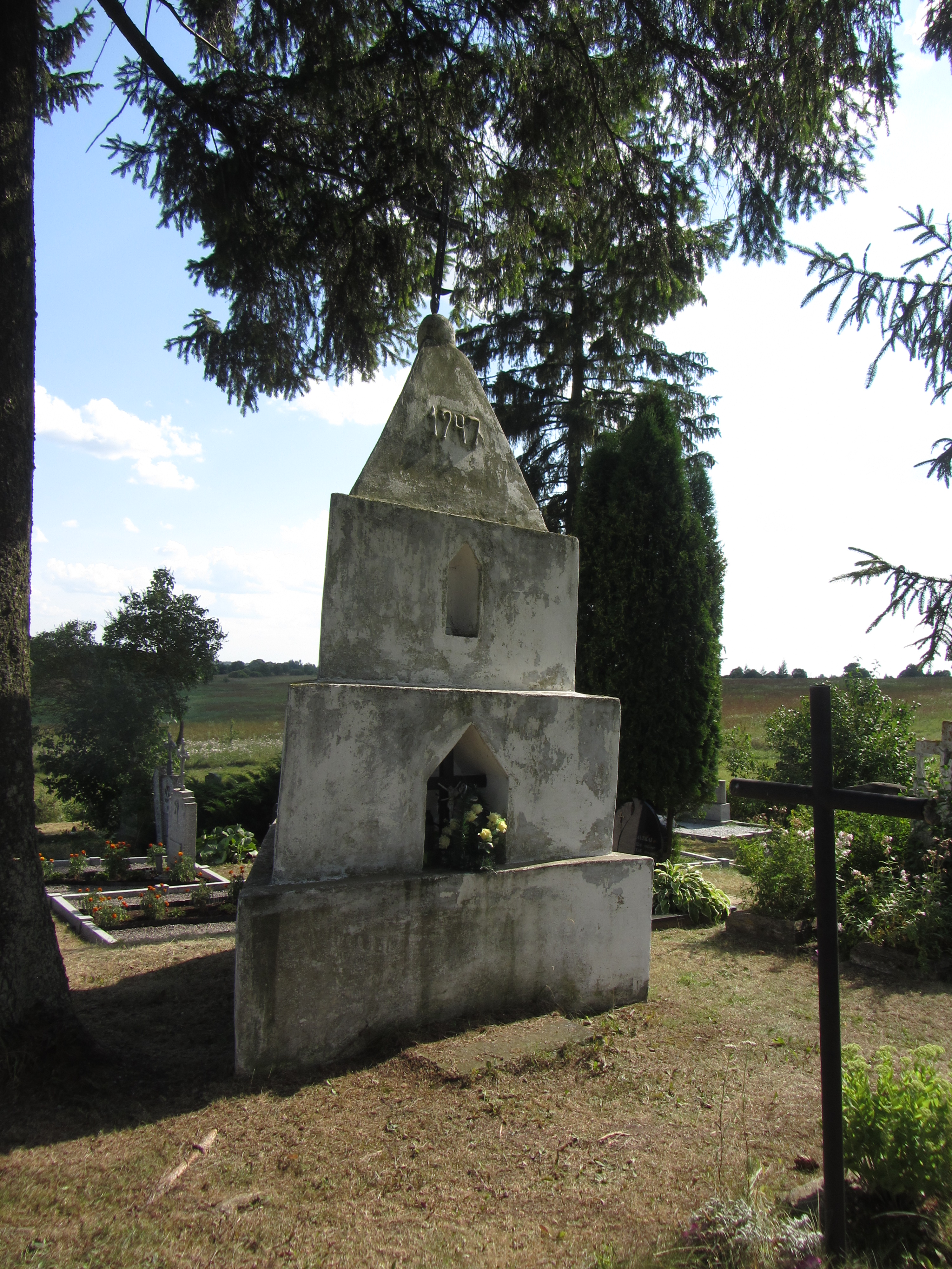 Kukutėliai 30161, Lithuania